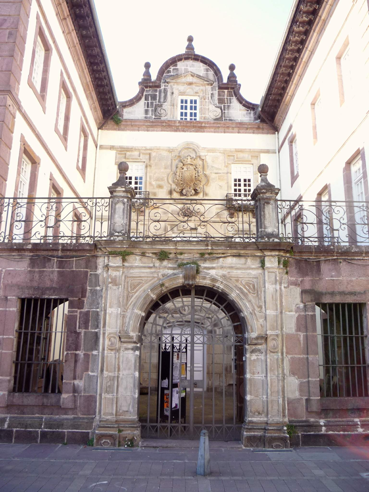 Elizondo (Baztan) - Palacio Arizkunenea (Casa de Cultura de Baztan